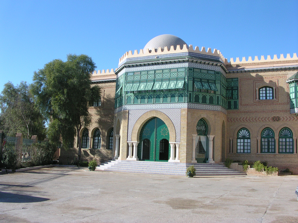 Musée Dar Cheraït à Tozeur (Tunisie).